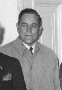 Bep Schrieke (1890-1945), Nederlands politicus